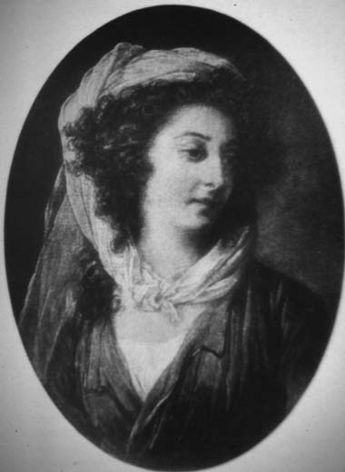 Portrait de Geneviève Adélaïde Helvetius, comtesse d'Andlau (1754-1847), fille de Claude Adrien Helvétius